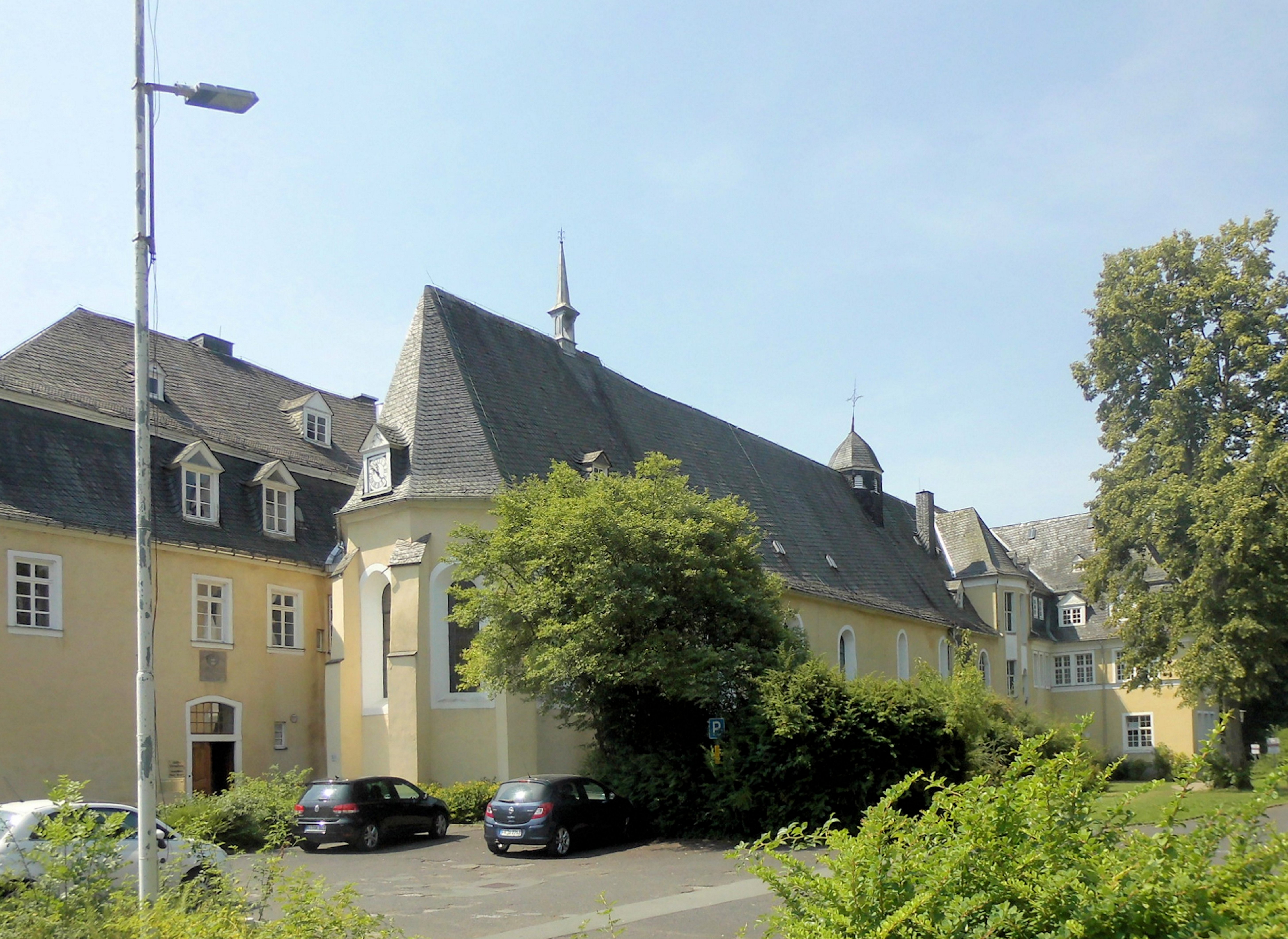 Kirche des Stifts Keppel in Allenbach, Stadt Hilchenbach